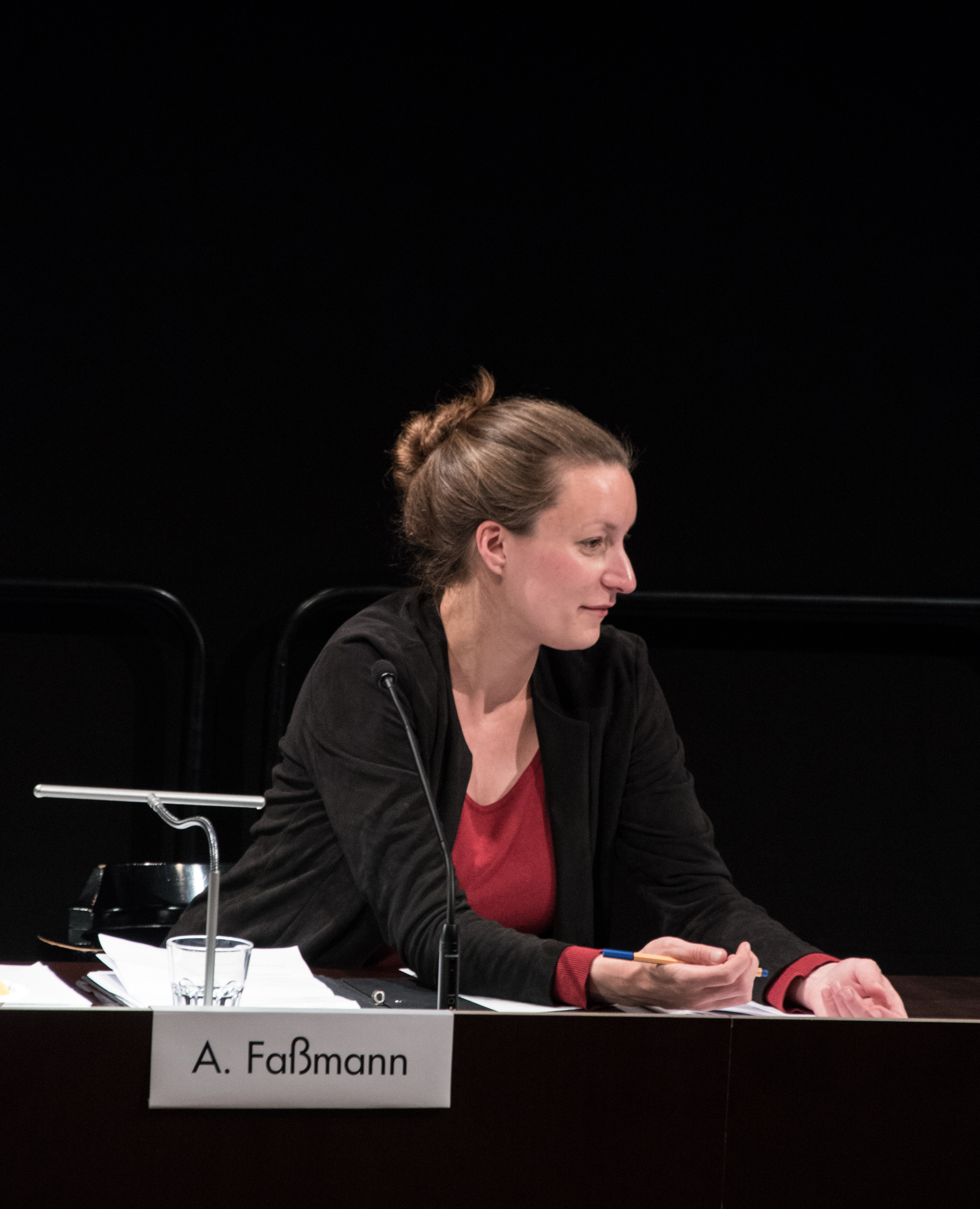 Das Kapitalismustribunal, Brut, 2016